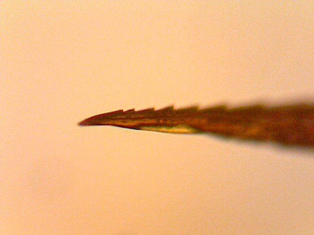 Pointe du dard extrait d'une guêpe 6h après la mort. Le fluide jaune est du venin sortie de la glande suite à des pressions lors de la manipulation